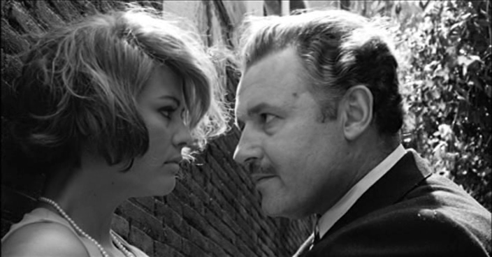 Screenshot del film Gli indifferenti (1964) di Francesco Maselli.